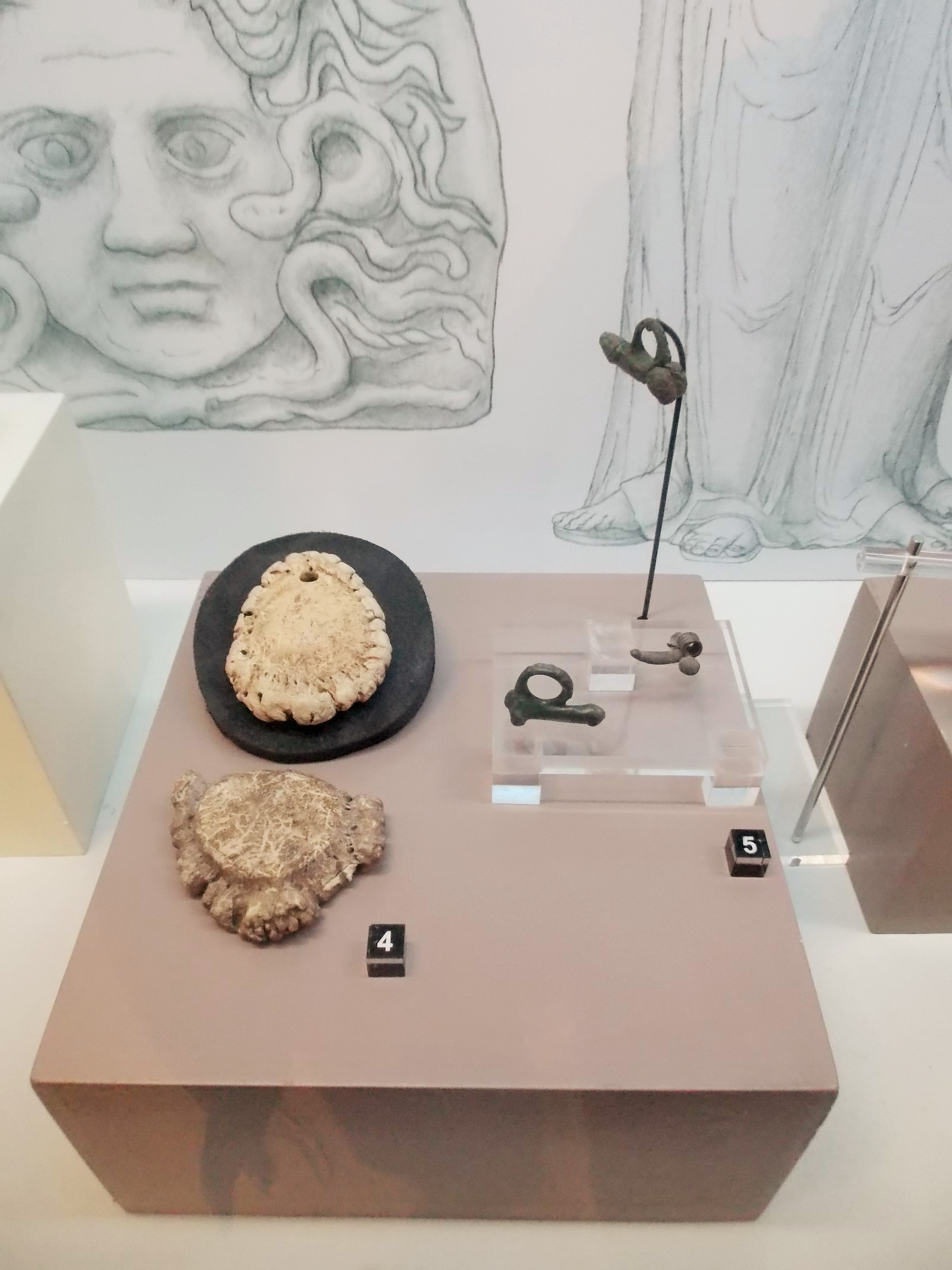 Pendentifs magiques romains circulaires ou phalliques conservés au Musée gallo-romain de Fourvière, à Lyon, en France. N°4 : deux amulettes en bois de cerf découvertes à La Dent, Meyzieu (dans le 69). Elles sont percées d'un trou pour les suspendre autour du cou. Le bois de cerf était un symbole de force et de régénération dans la culture romaine. N°5 : trois pendentifs phalliques (fascinum) faits dans un alliage de cuivre. Découverts lors d'une fouille du quai Arloing à Lyon (dans le 9e arrondissement) et de fouilles villa Montel, 41-43 rue du Bourbonnais. Ils proviennent d'une nécropole du Ier siècle apr. J.-C. Le phallus symbolise la propagation de la vie et la fécondité; il protège aussi contre le mauvais sort. Les représentations de phallus étaient fréquentes dans la culture romaine. On en trouve aussi dans d'autres civilisations (précolombiennes, indienne thaïlandaise).